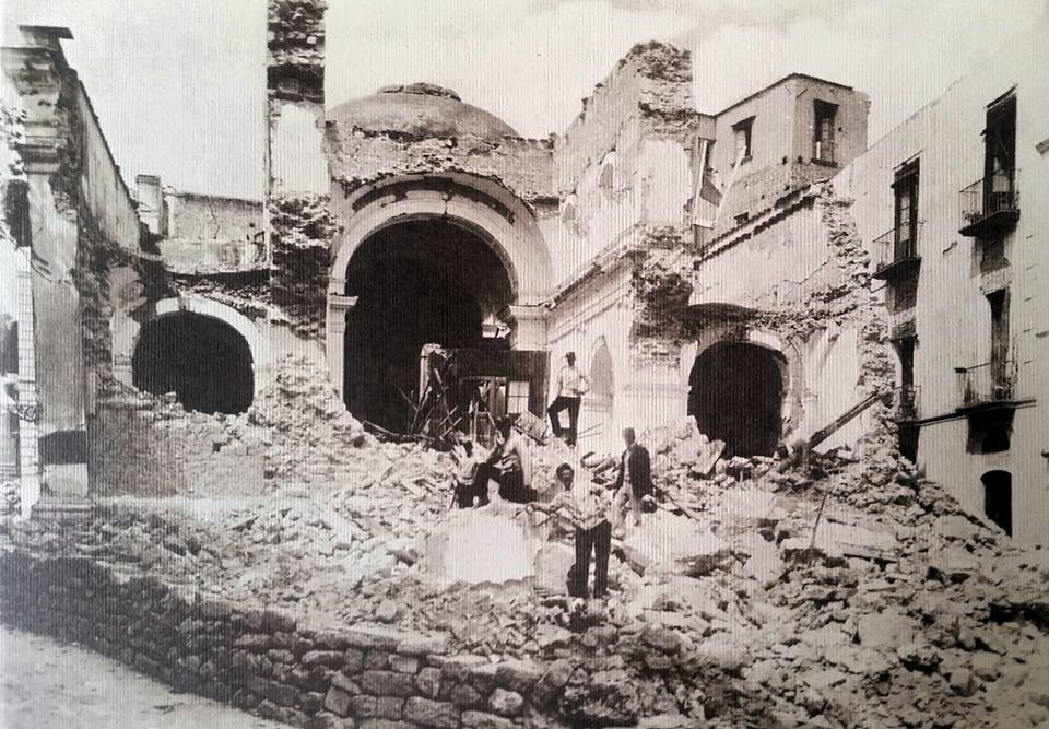 Isola di Ischia, Casamicciola - Chiesa distrutta dal terremoto del 1883. Numero di catalogo sconosciuto.